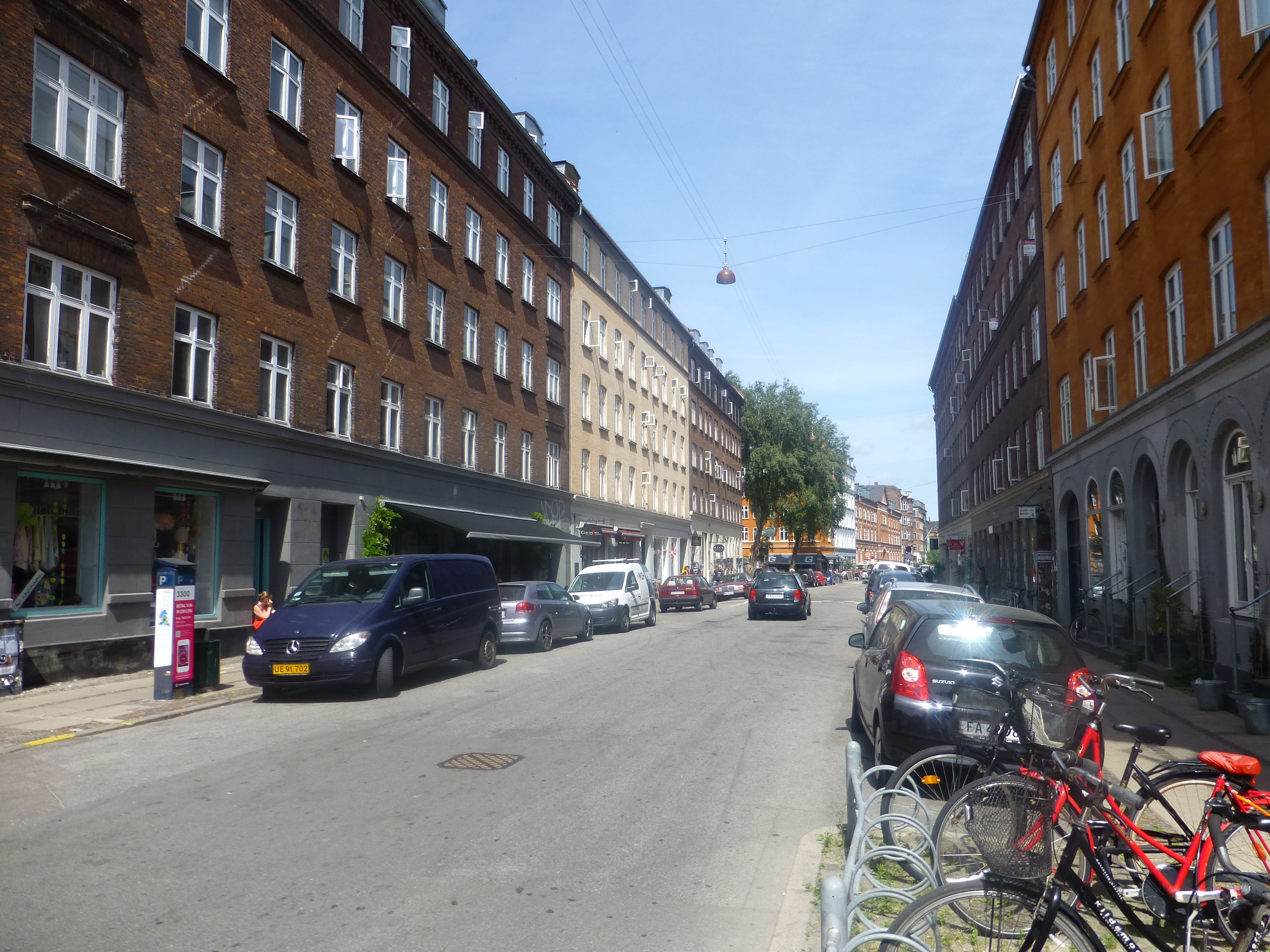 The street Ravnsborggade in Nørrebro in Copenhagen.